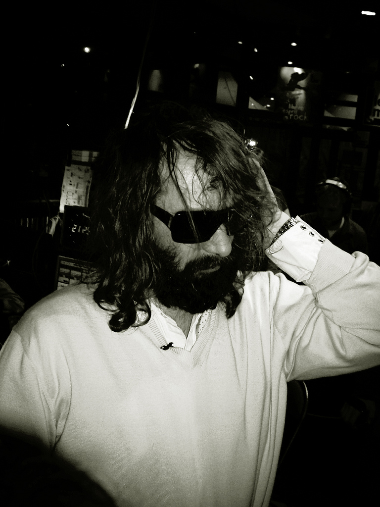 Sébastien Tellier au Printemps de Bourges 2008 Sébastien Tellier at Printemps de Bourges 2008